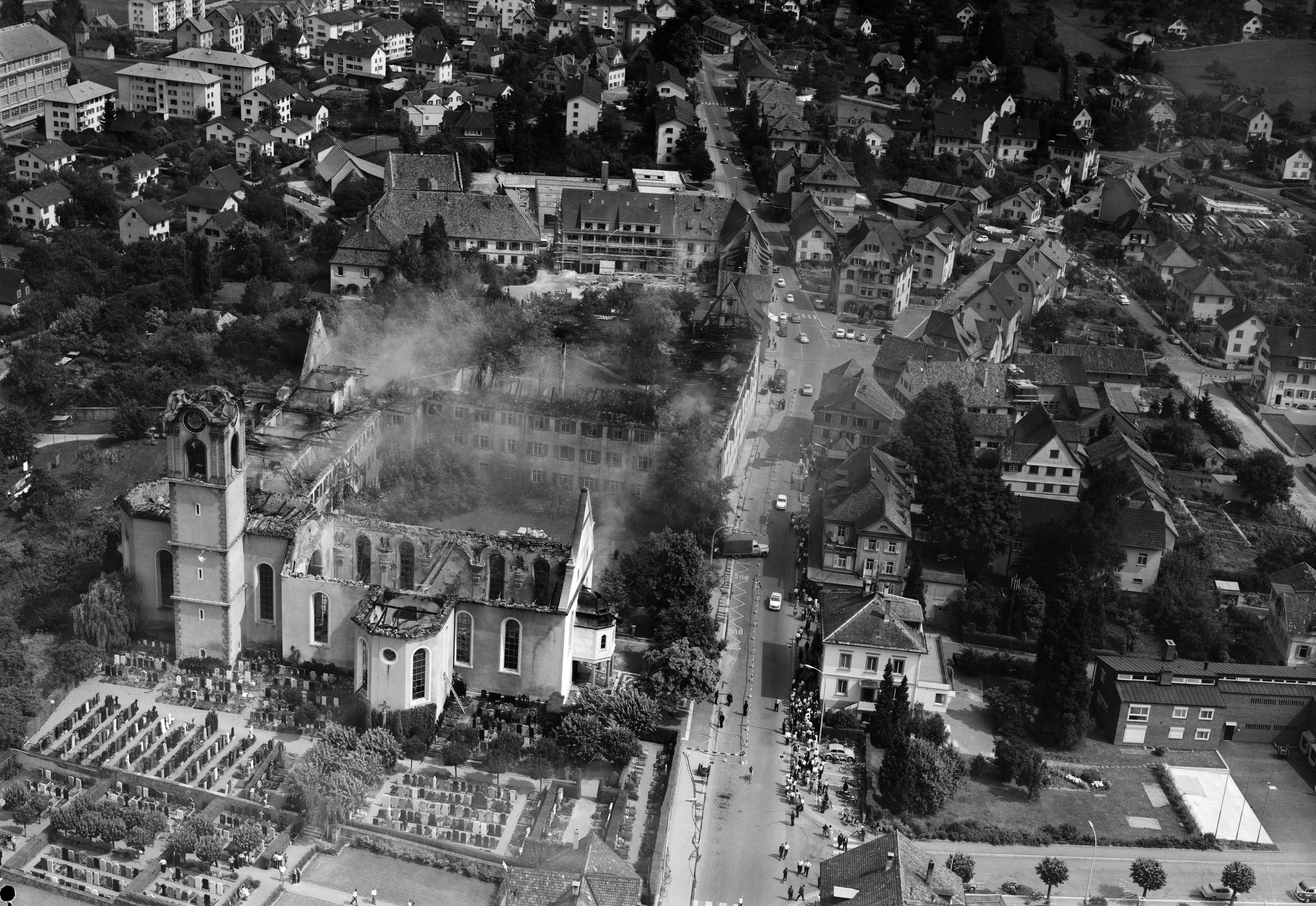 Kreuzlingen, Brand der Klosterkirche St. Ulrich